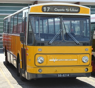 De Citosa 1107 standaard streekbus van het Haags Bus Museum (